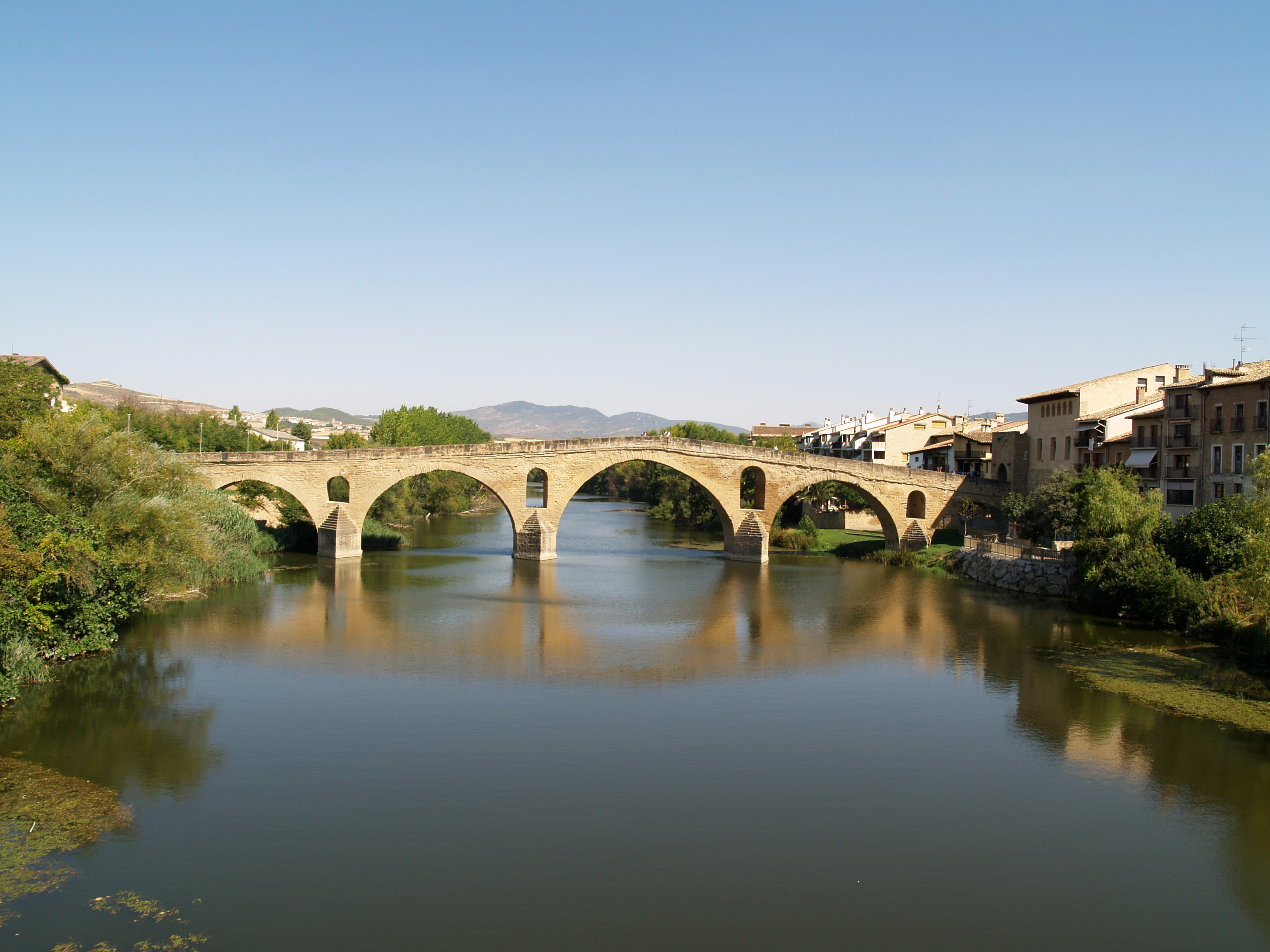 Puente la Reina - Pont romànic